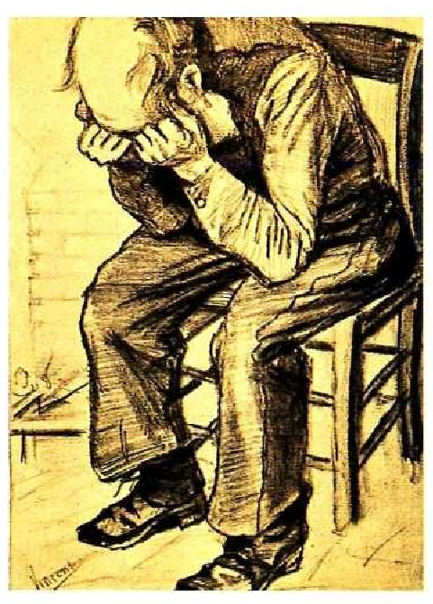 Vincent Van Goghen Agure tristea, arkatzez egindako marrazkia.